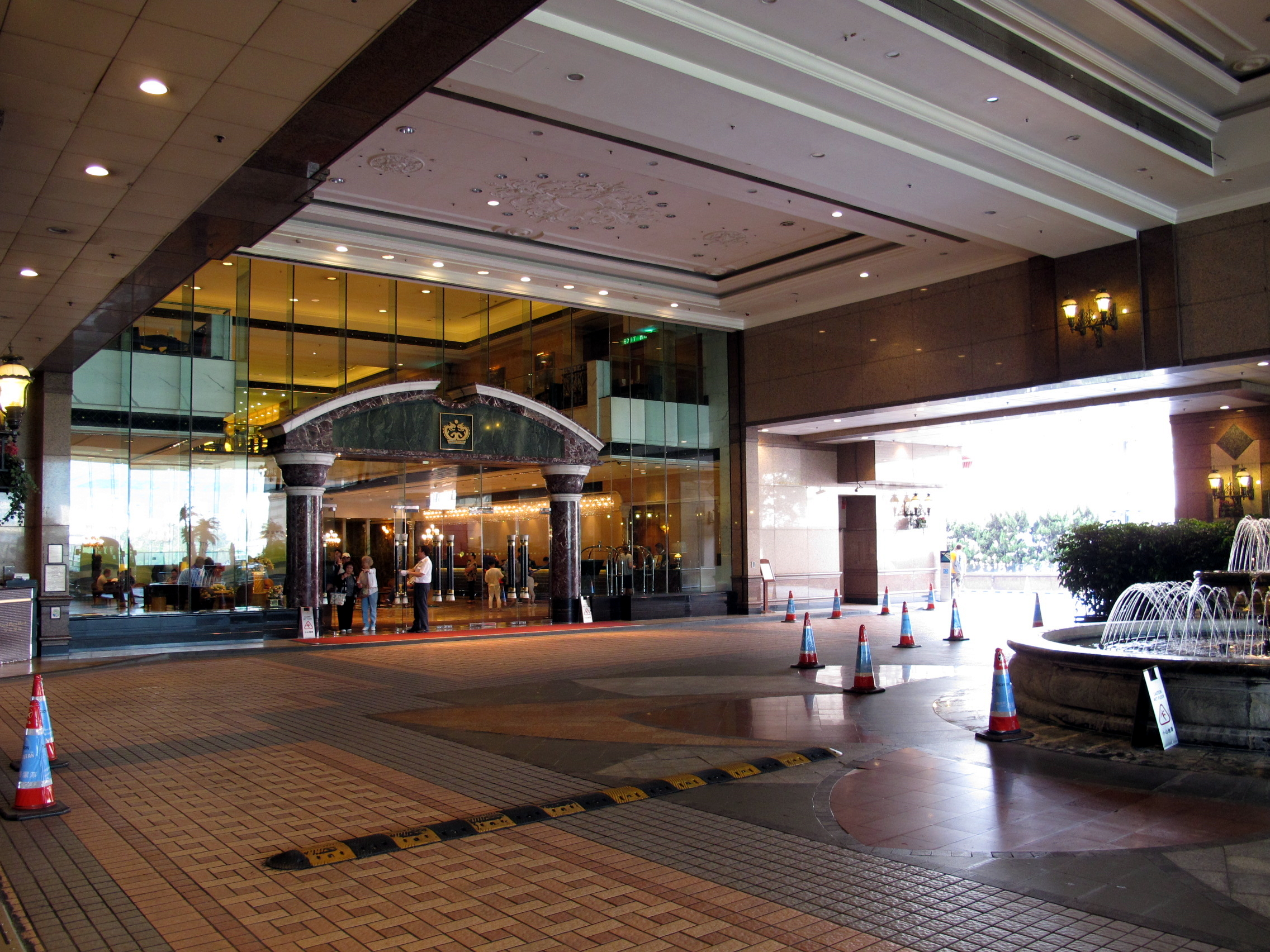 Royal Plaza Hotel Main Enterance